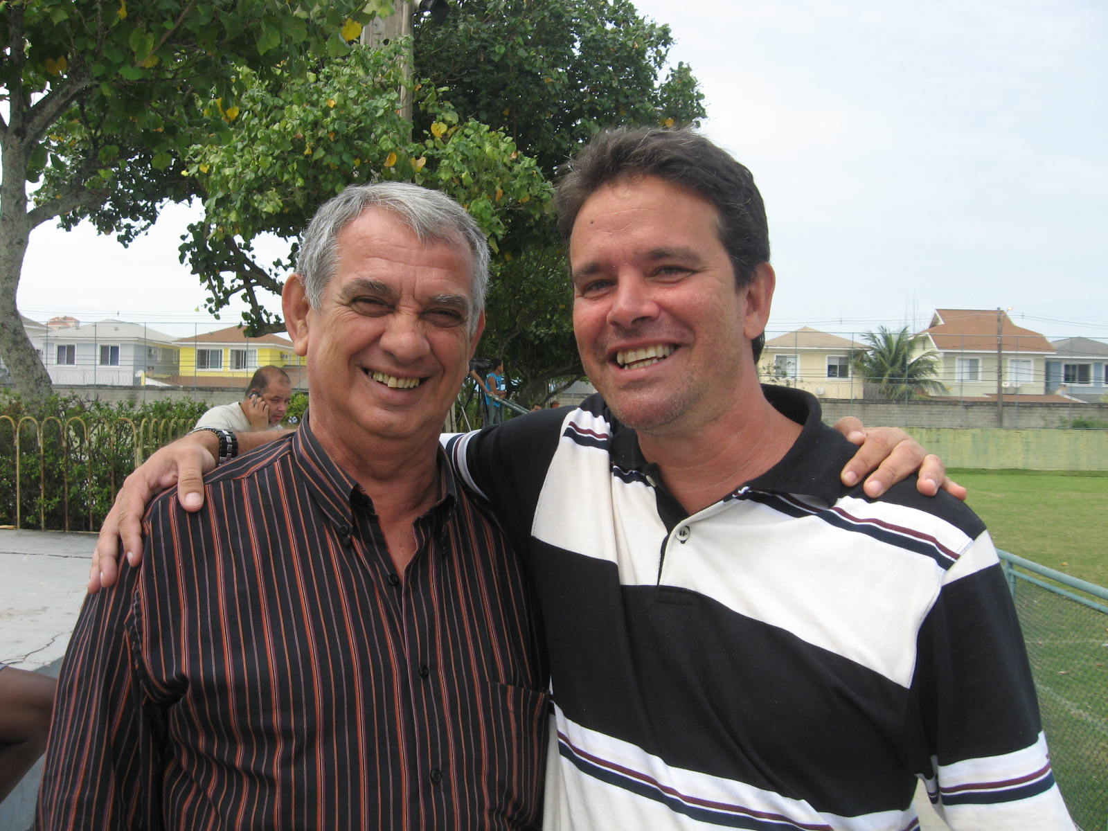 Walquir Pimentel ladeado pelo ex-atleta Ezio.